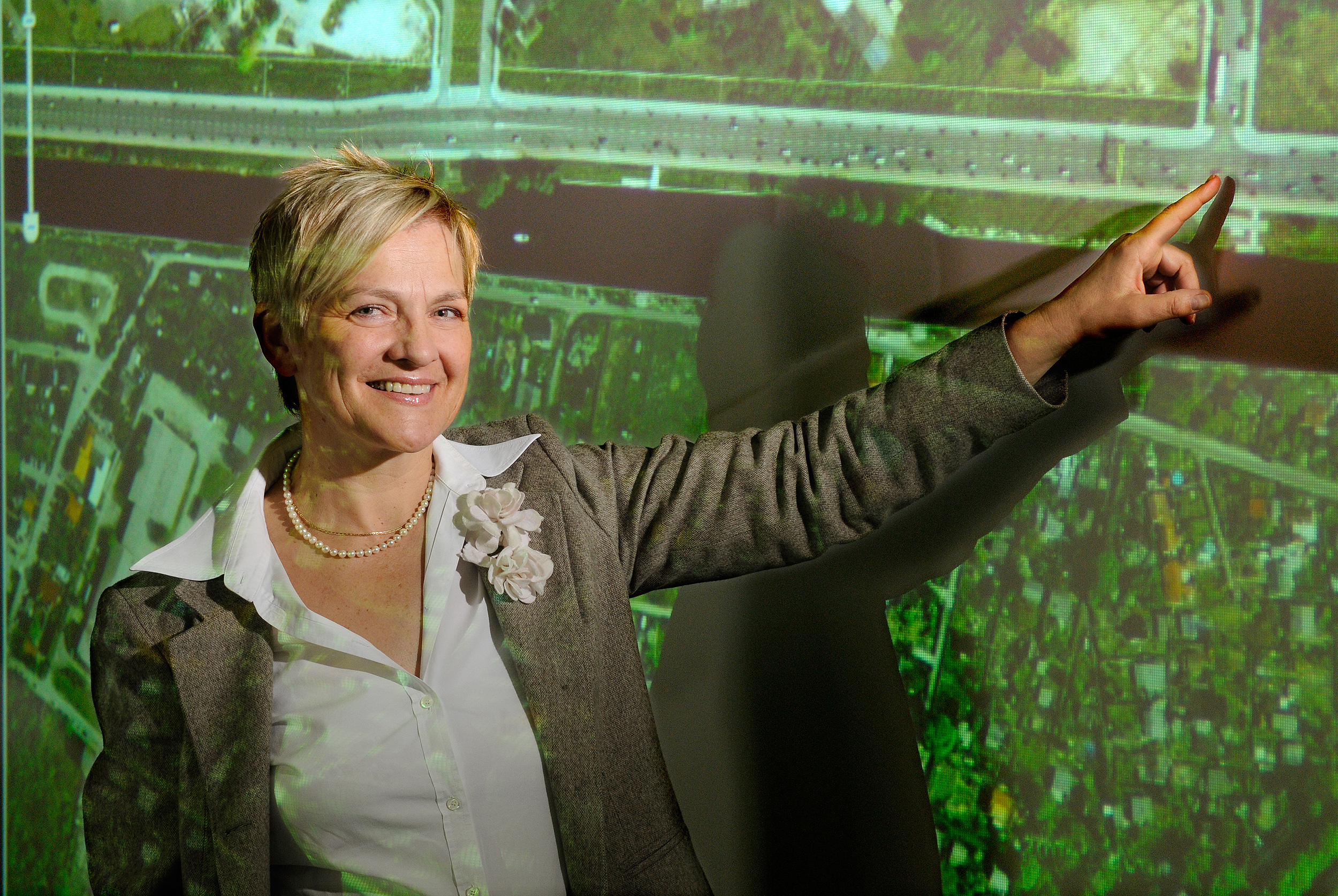 Institutsdirektorin Prof. Barbara Lenz und ihre Mitarbeiter forschen in den Schwerpunkten Wirtschafts- und Personenverkehr. Wie entwickelt sich unsere Mobilität in Zukunft, welche Rolle spielen die verschiedenen Verkehrsträger in 20 Jahren? Fragen wie diesen geht Barbara Lenz auf den Grund.